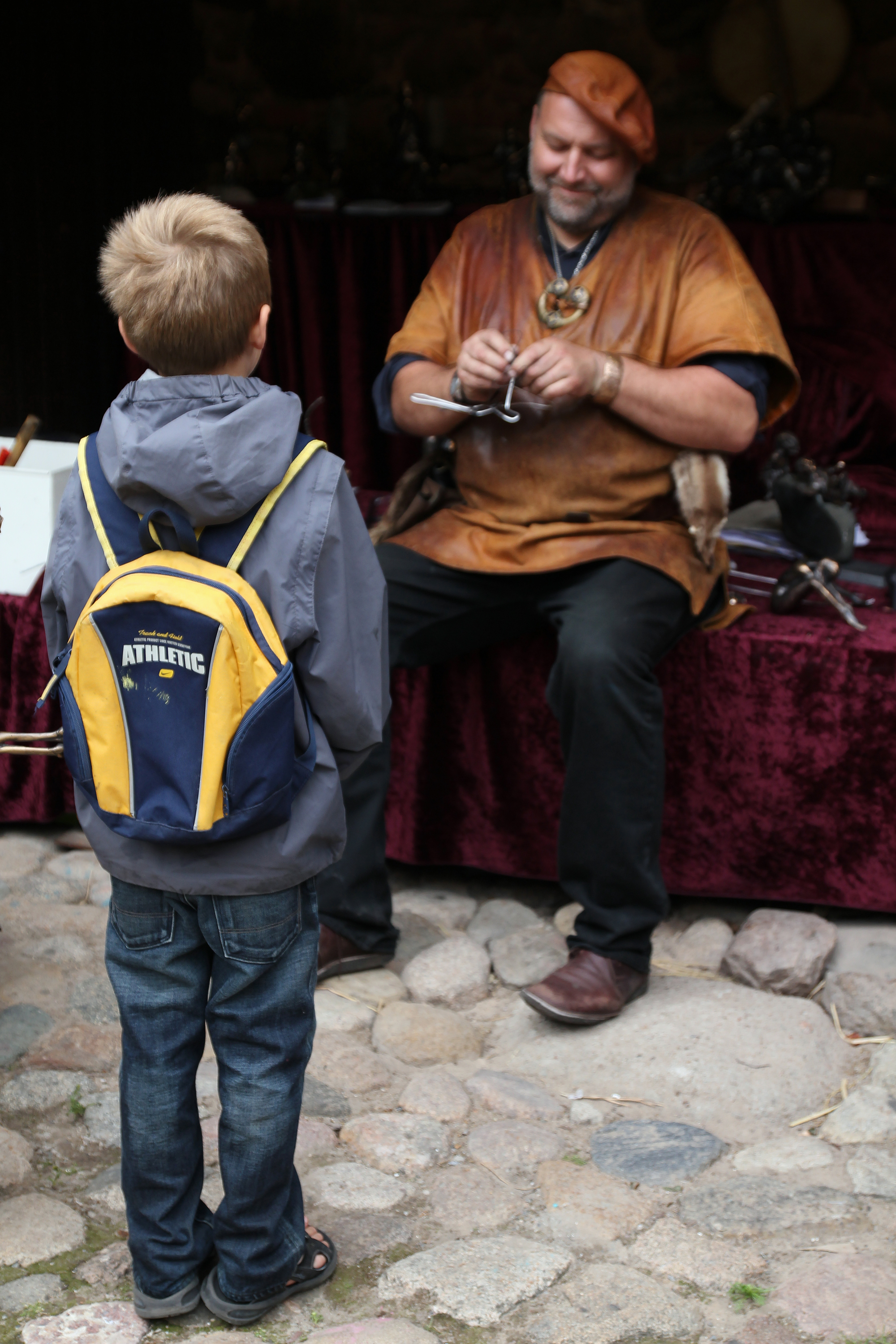 2013.a. Hansapäevad, Tauno Kangro Antoniuse õues